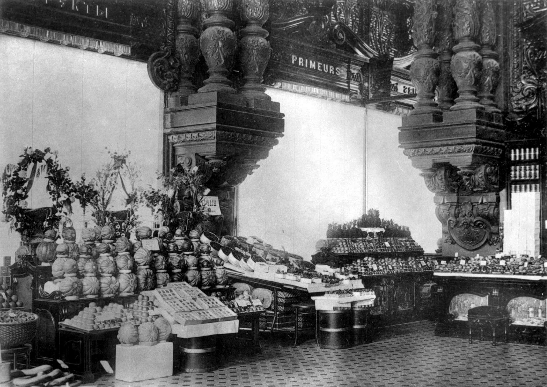 Магазин Елисеева и погреба русских и иностранных вин. Фруктовый отдел